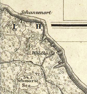 Burgwall Schanzenort: Schanzenort (I), Falkenberger Ufer (II), (linker Bildausschnitt) Messtischblatt 376, 316a: Middelhagen (Ausschnitt), , 1:25000 Aufnahme 1885, herausgegeben 1887, einzelne Nachträge 1909, Berlin: Reichsamt für Landesaufnahme, 1909